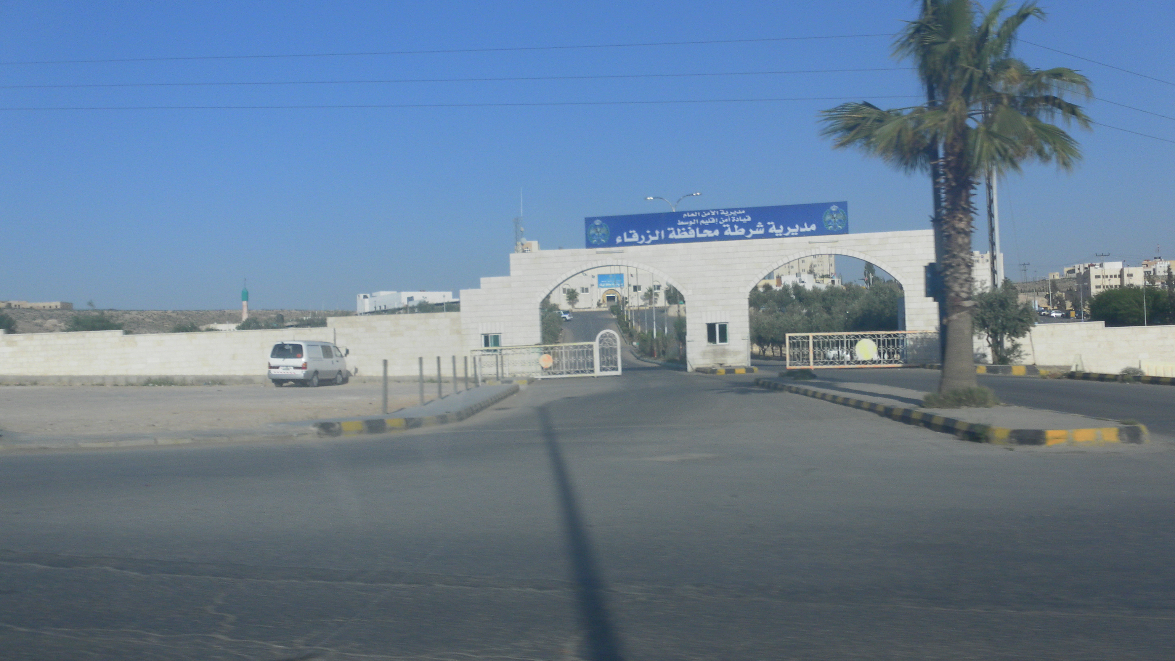 مديرية شرطة محافظة الزرقاء